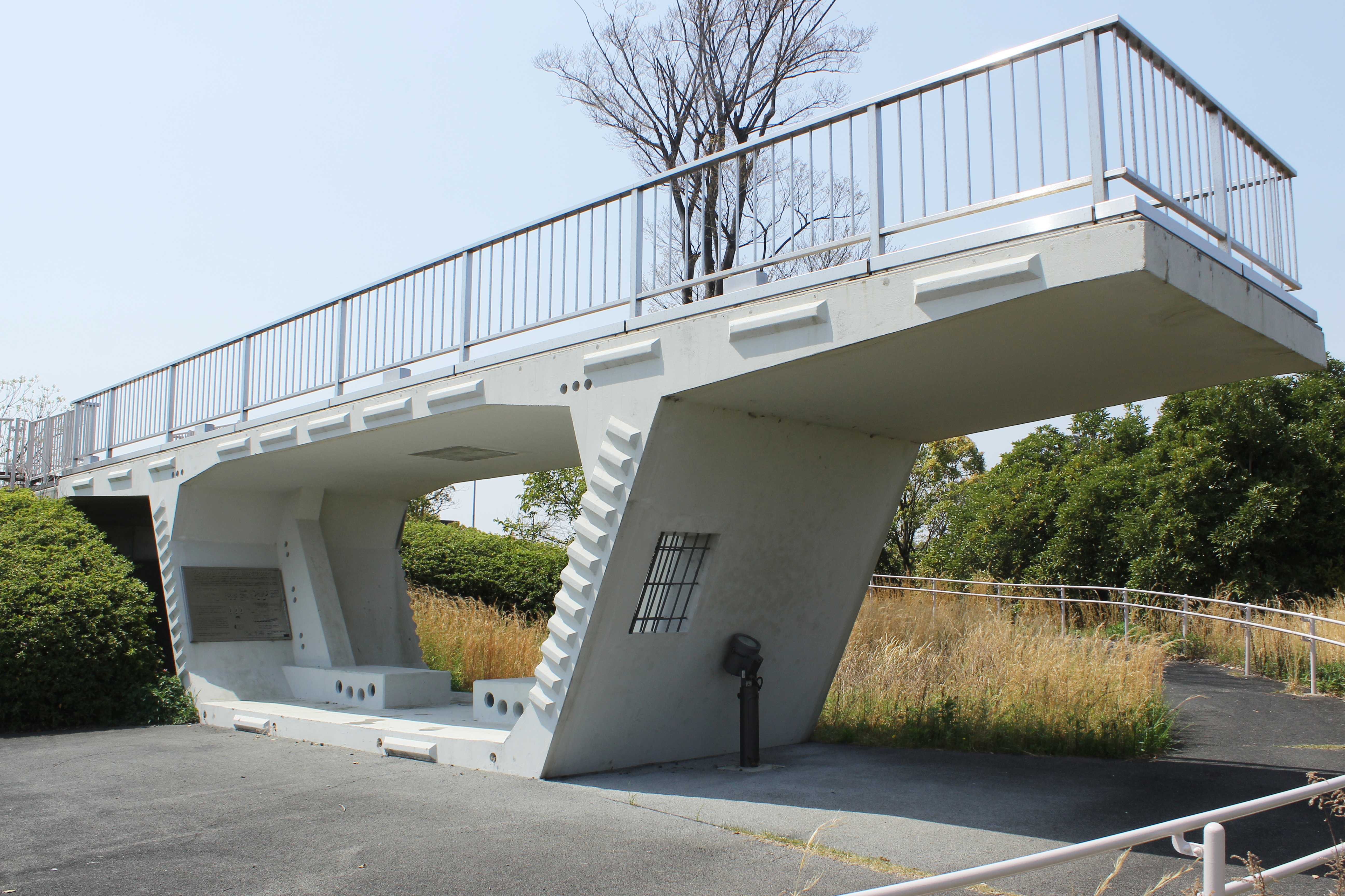 湾岸長島PA（下り線側）の展望台に使われているプレキャストセグメント